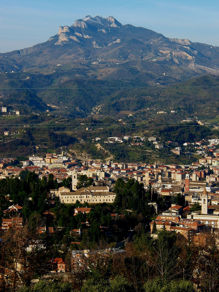 Ascoli Piceno, Marche, ItaliaAscoli Piceno e Monte Ascensione